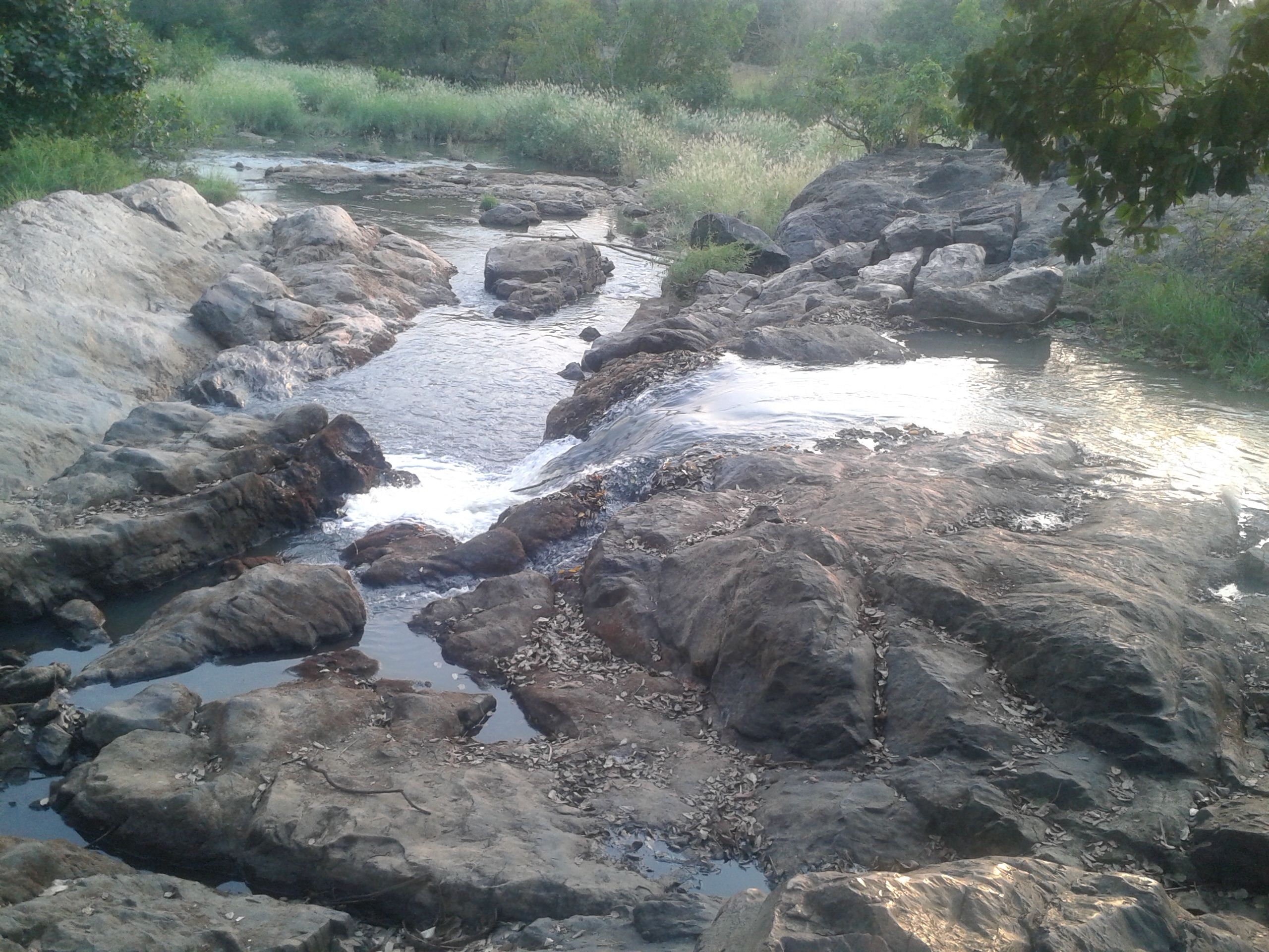 Chute de Nana Bakassa en Centrafrique This is an image of Cultural Fashion or Adornment from Central African Republic